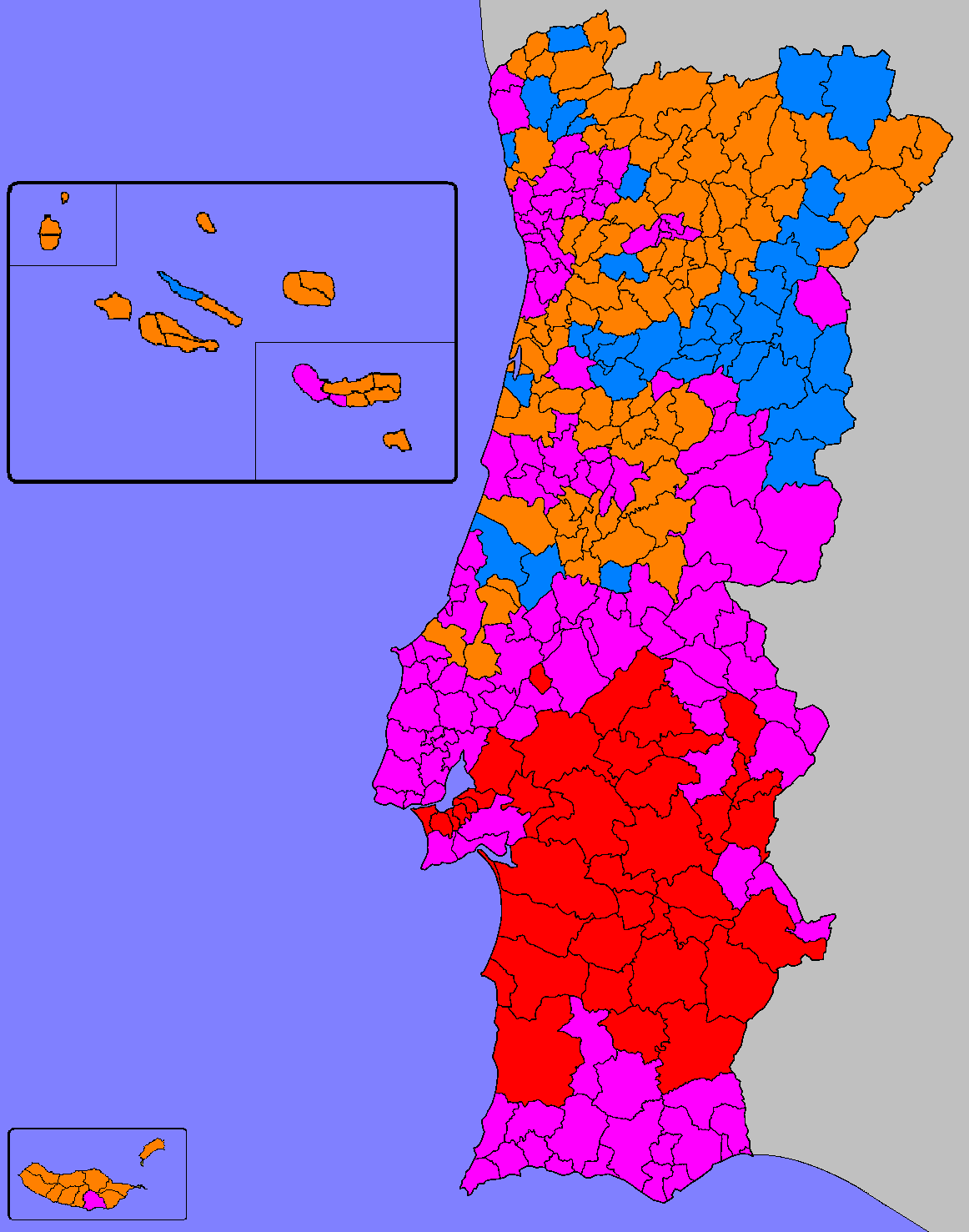 Mapa ilustrativo do partido mais votado por Concelho